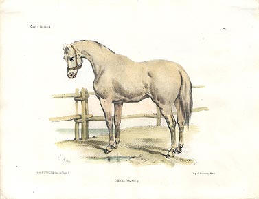 Cheval navarrin par Victor Adam (1801 - 1886) Imprimerie Monrocq à Paris, lithographie rehaussée à l'aquarelle, 32 x 25.